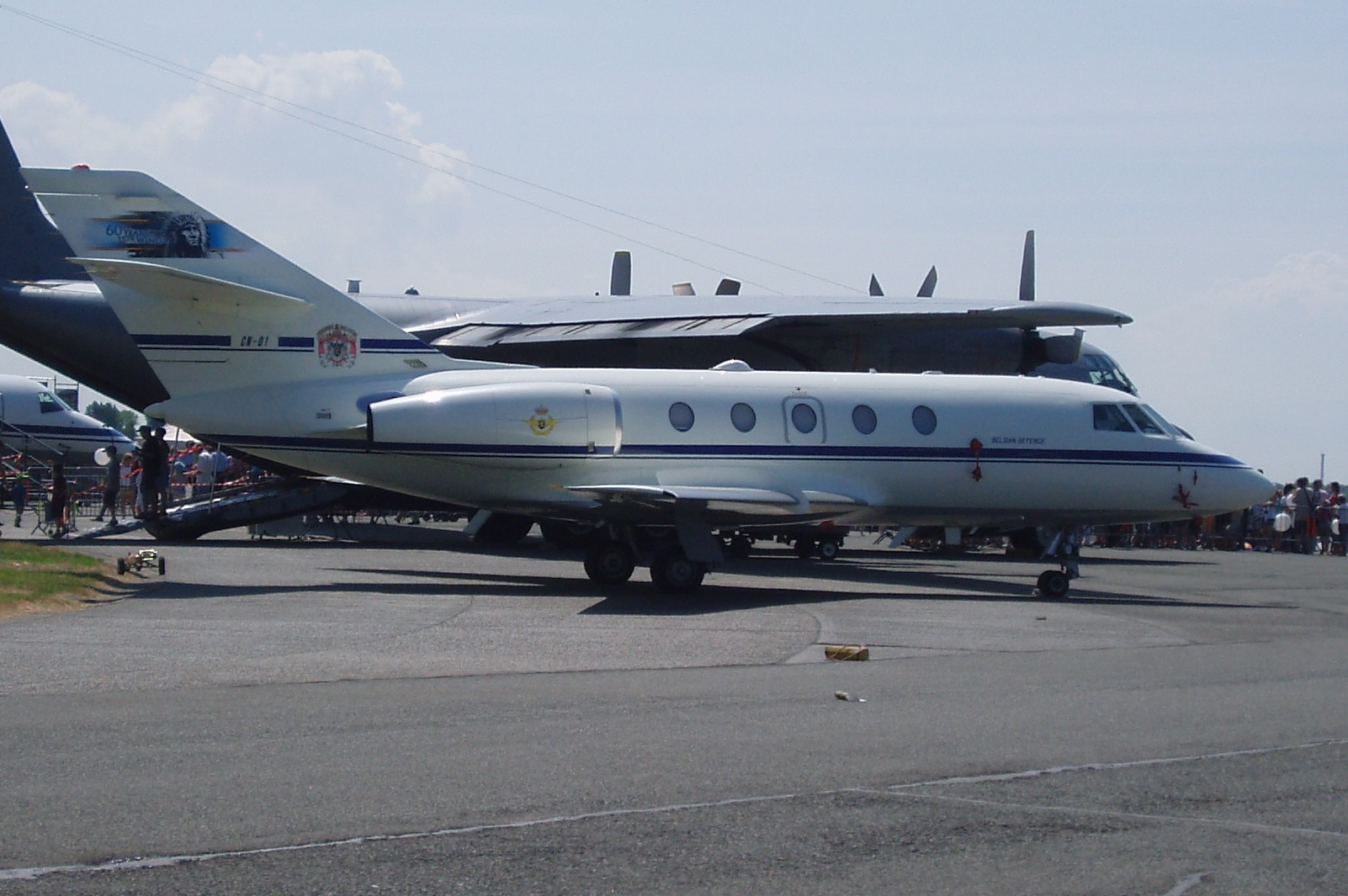 Falcon 20 Belgian defense à Koksijde Belgium